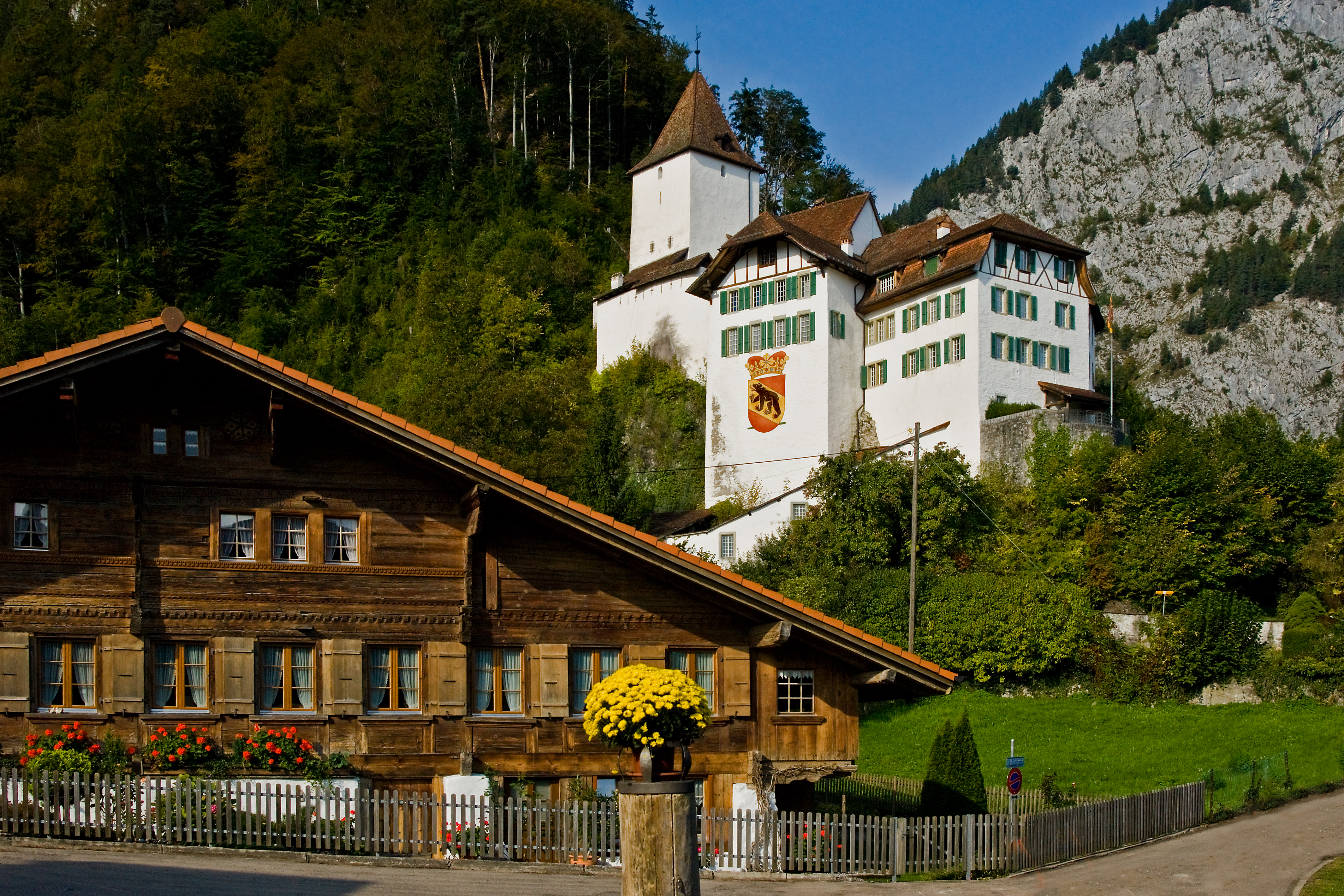 Wimmis, im malerischen Dorf am Eingang ins Simmental steht das Schloss zuoberst auf dem Hügel